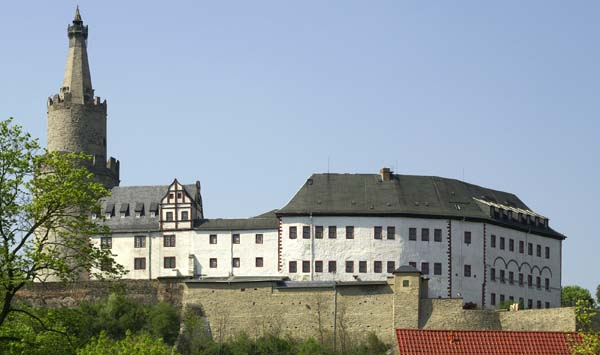 Osterburg, Weida, Thuringia, Germany